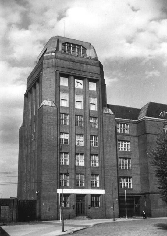 Berlin, Rummelsburg, Staatliche AG für Maschinenbau Zentralbild Weiß 4.9.1953 SAG-Betriebe werden zurückgegeben Bei den Verhandlungen unserer Regierungsdelegation vom 20. bis 22.8.1953 in Moskau, die im Sinne tiefer Freundschaft und voller Gleichberechtigung der beiden Staaten verliefen, kam die sowjetische Regierung zu dem Entschluß, die 33 SAG - Betriebe, die sich noch auf dem Territorium der Deutschen Demokratischen Republik befinden, dem deutschen Volk ab 1.1.1954 zurück zugeben. UBz: Staatliche AG für Maschinenbau "AMO" (vorn. Knorr-Bremse), Berlin-Rummelsburg.